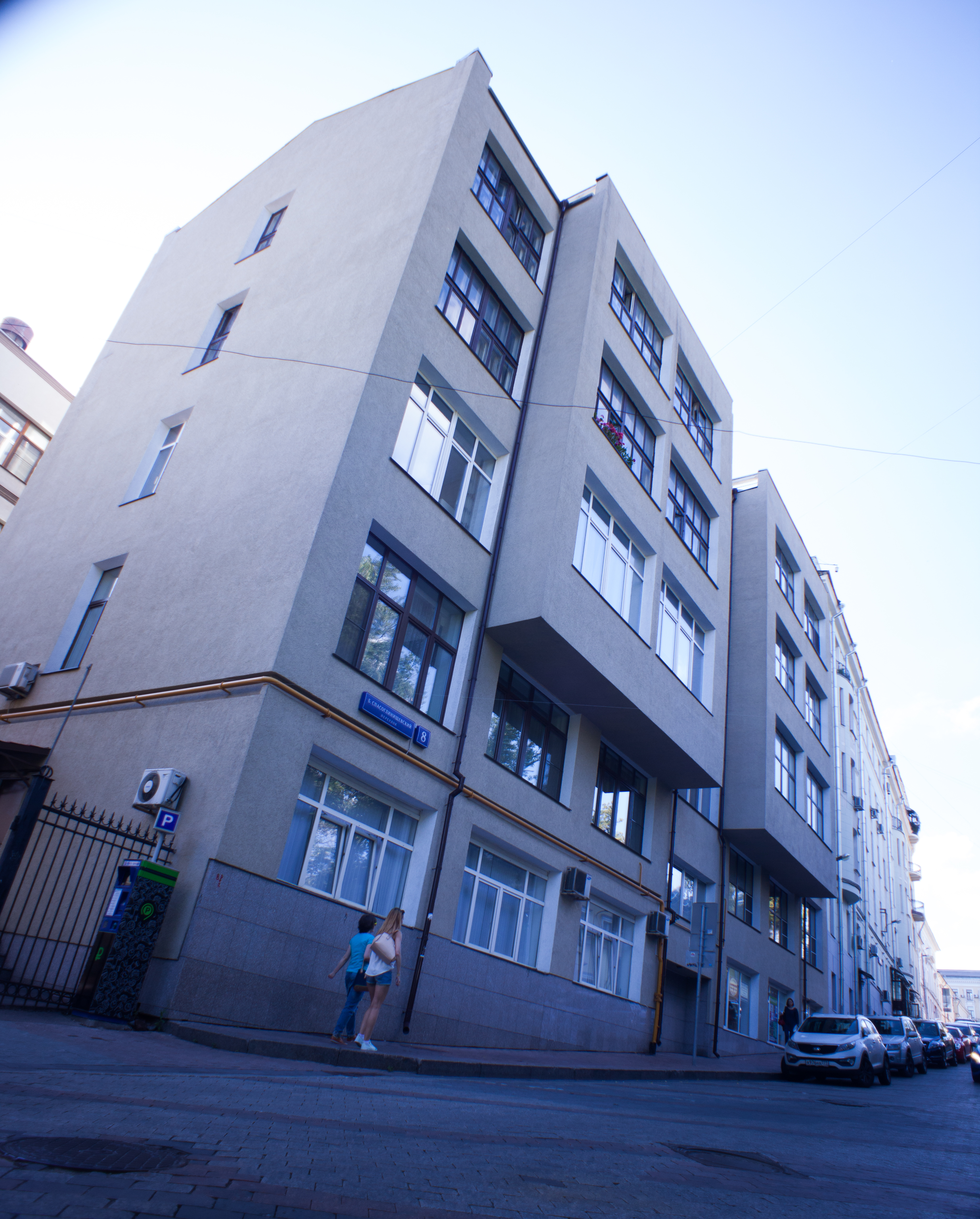 жилое и административное здание «Текстильстроя»